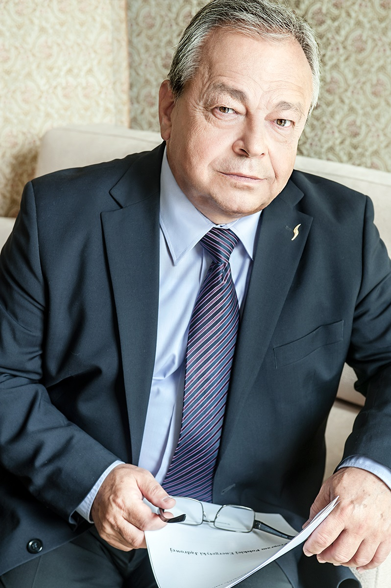 Janusz Włodarski